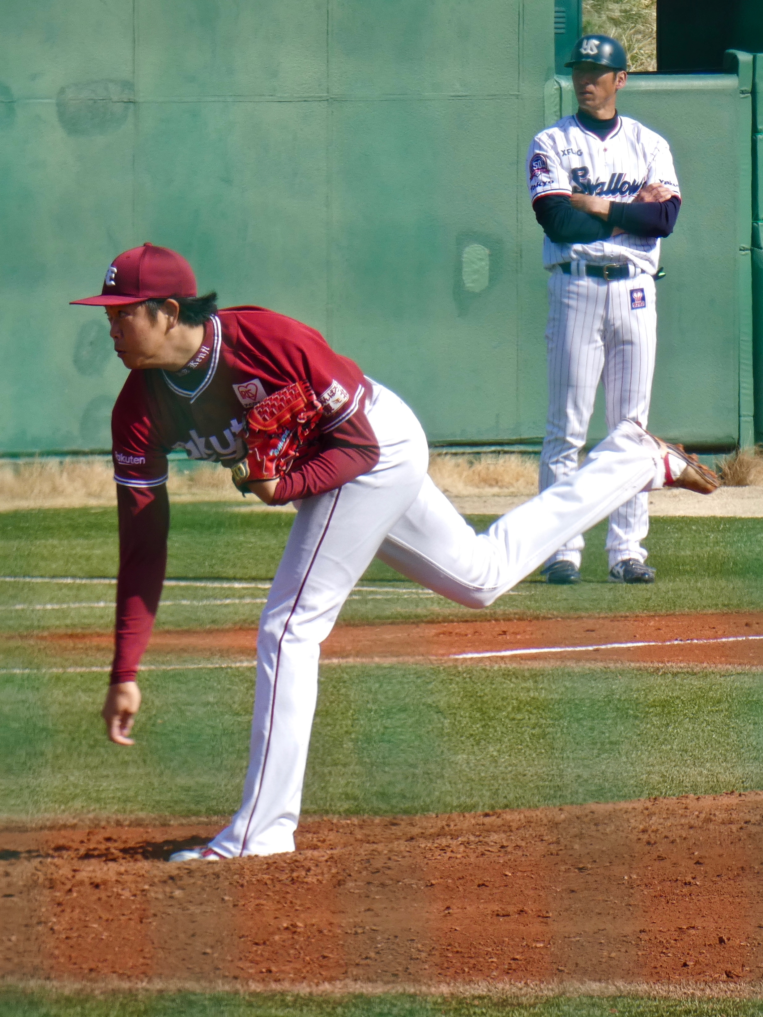 ヤクルト戸田球場にて